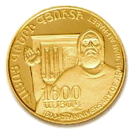 Аверс армянской золотой монеты 2002 года. Маштоц